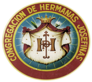 Placa con el escudo de las Hermanas Josefinas, congregación religiosa de México.